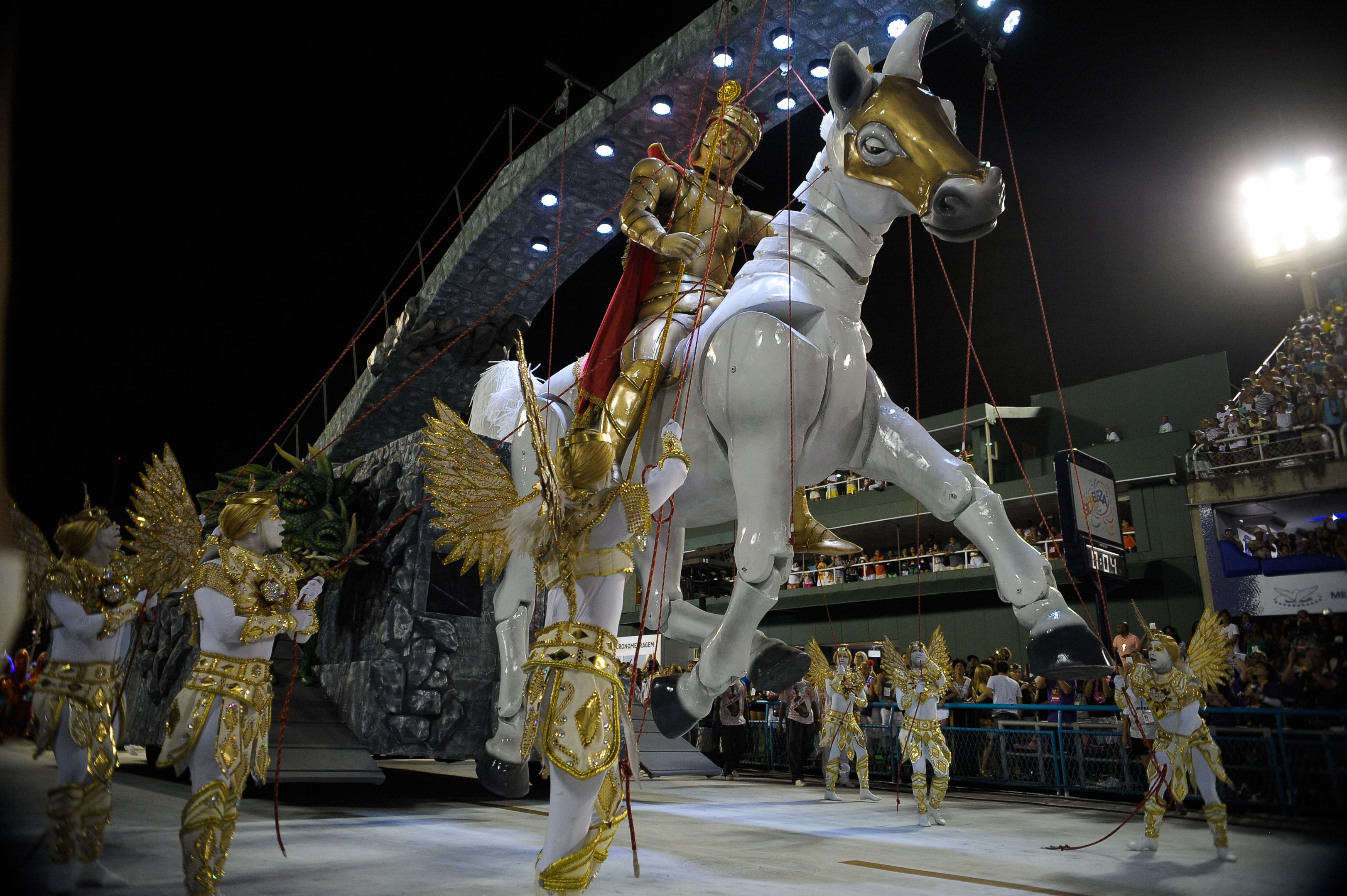 Rio de Janeiro - Escola Estácio de Sá é a primeira escola a entrar na Sapucaí,leva à avenida enredo sobre São Jorge (Tomaz Silva/Agência Brasil)